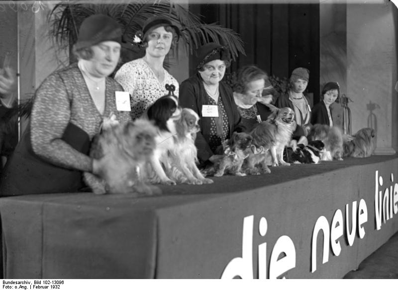 Dame, Kind und Hund, eine Schau der schönsten Luxushunde zugunsten der Winterhilfe im Berliner Zoo ! Preisgekrönte Luxushunde nach der Prämiierung.